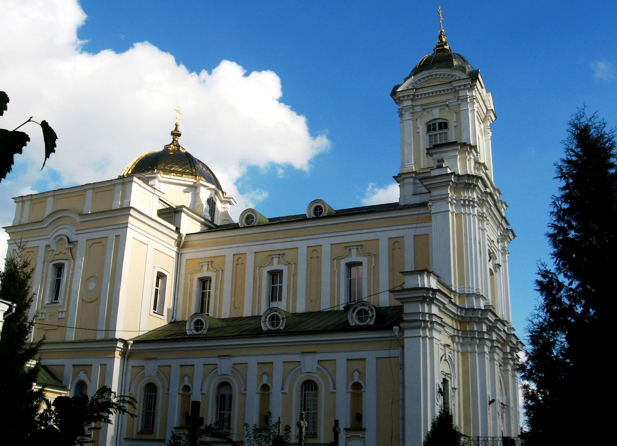 Луцьк. Свято-Троїцький собор